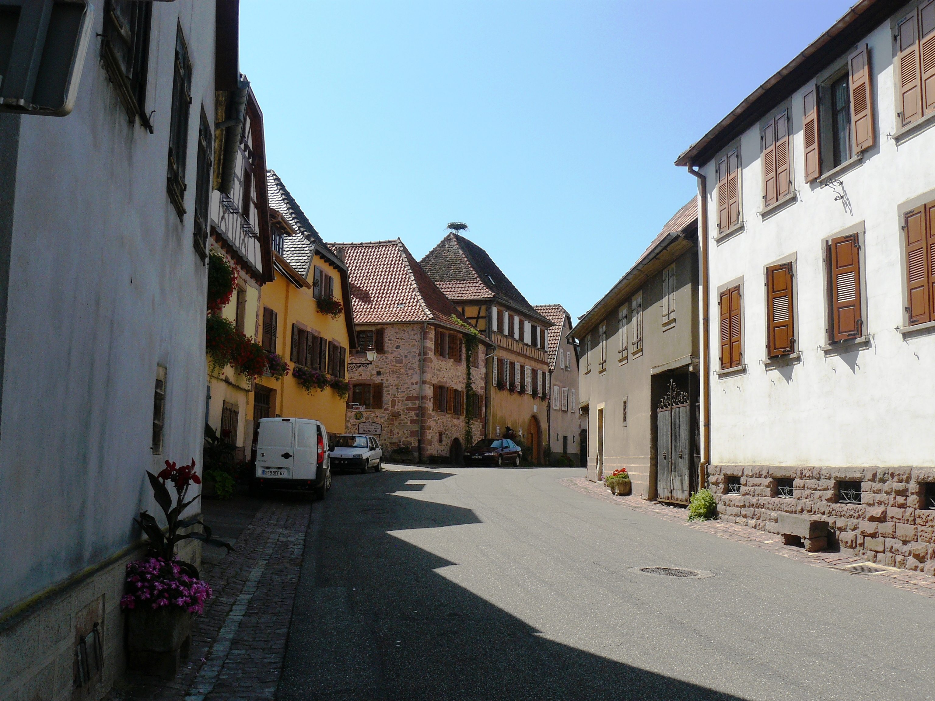 Le village et son artère principale d'ouest en est